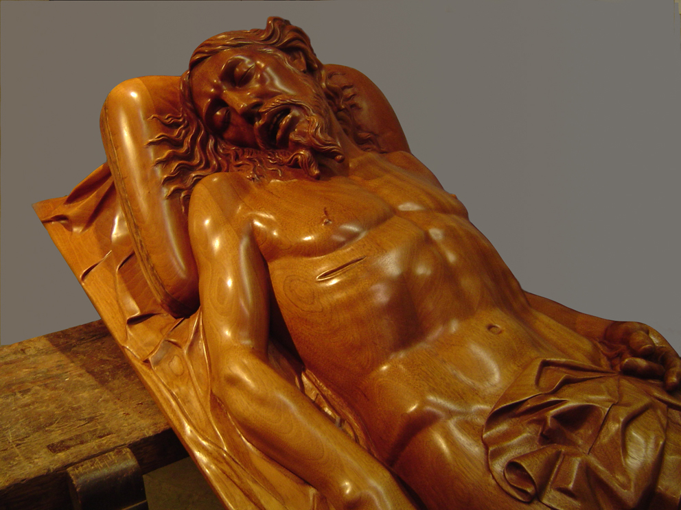 Cristo Yacente en Villanueva de la Reina por el escultor Medina Ayllon tallado en madera de caoba